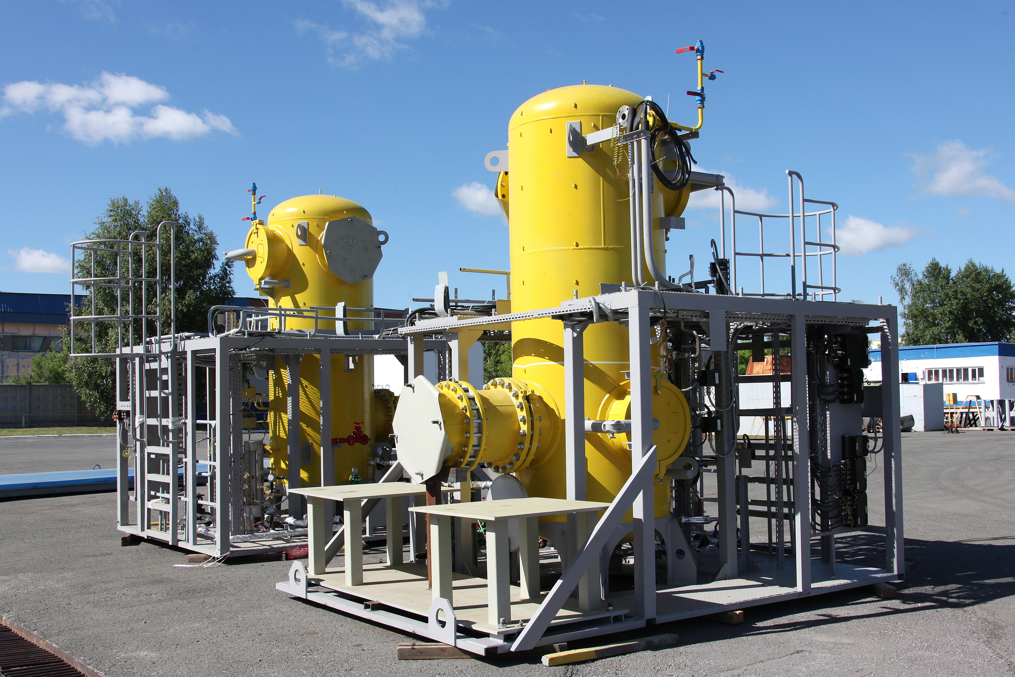 Сепараторы для газовой промышленности. г. Тюмень, Экспериментальный завод ООО «ТюменНИИгипрогаз».